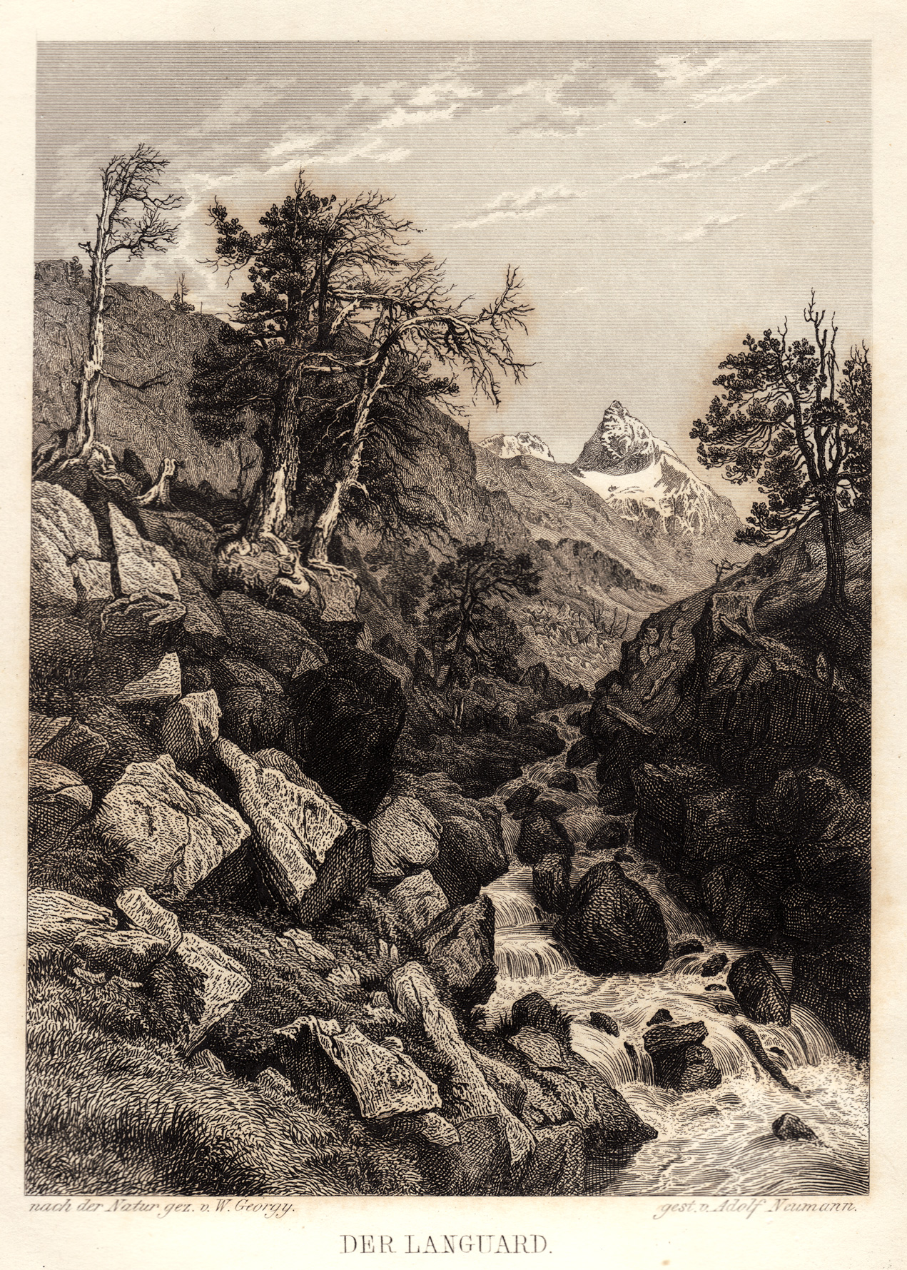 Der Languard - gezeichnet von Wilhelm Georgy, gestochen von Adolf Neumann